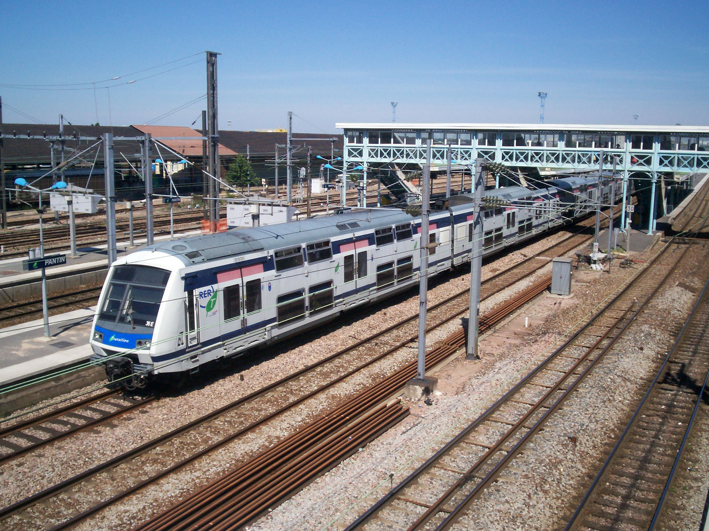 RER E - Gare de Pantin